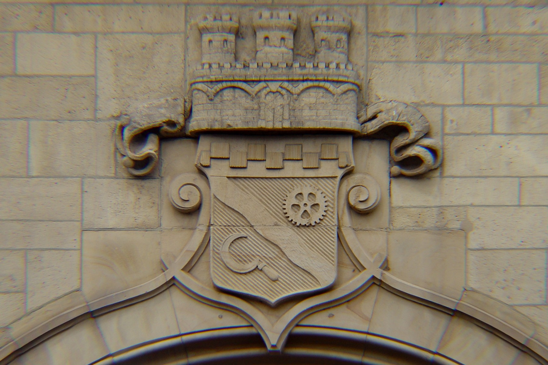 Stadtwappen Hilden über Portal Bürgerhaus, Hilden, Mittelstraße 40